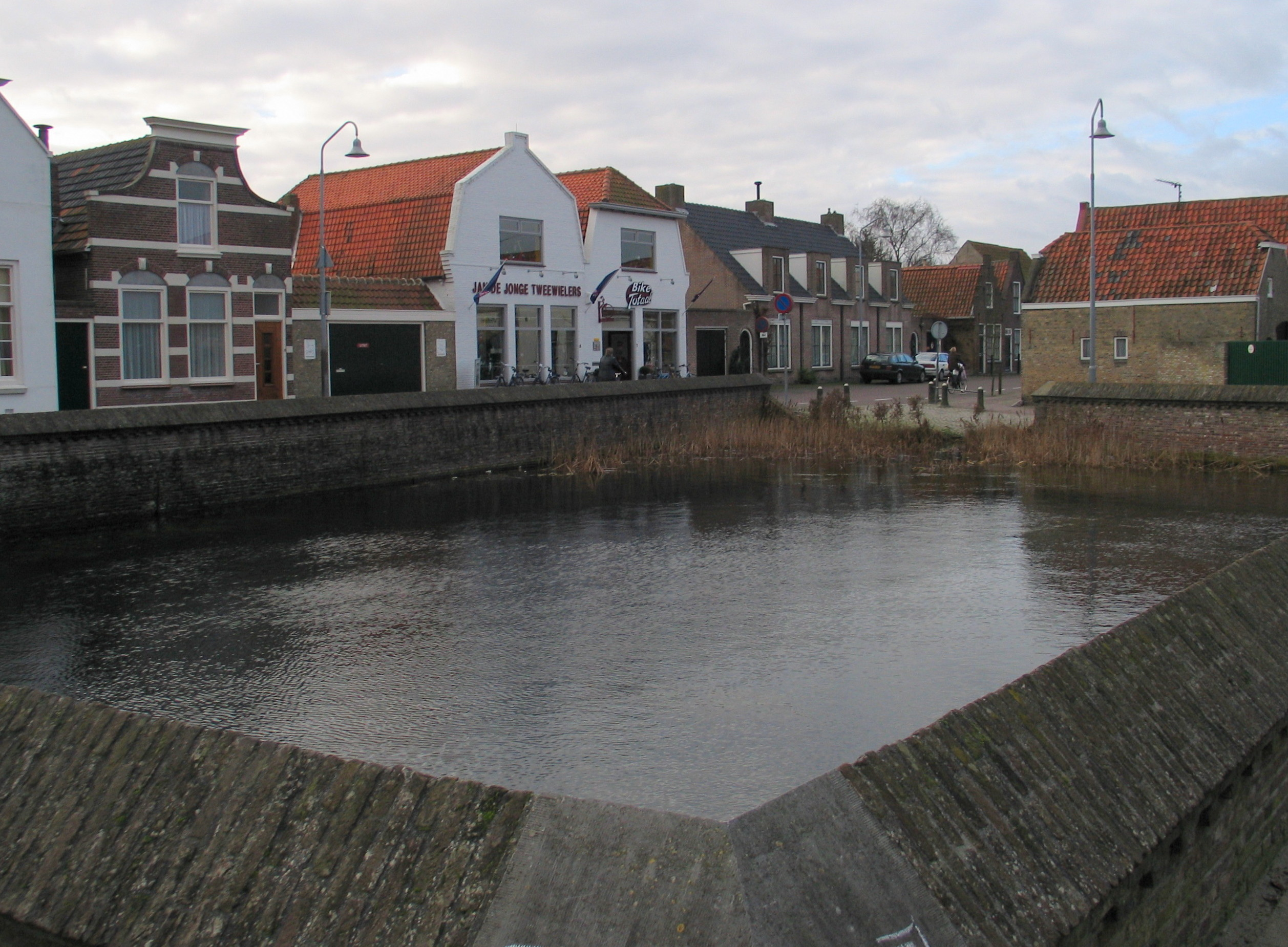 Volwelle - put die gebruikt werd in de lakenindustrie